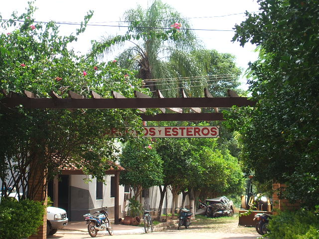 Plaza